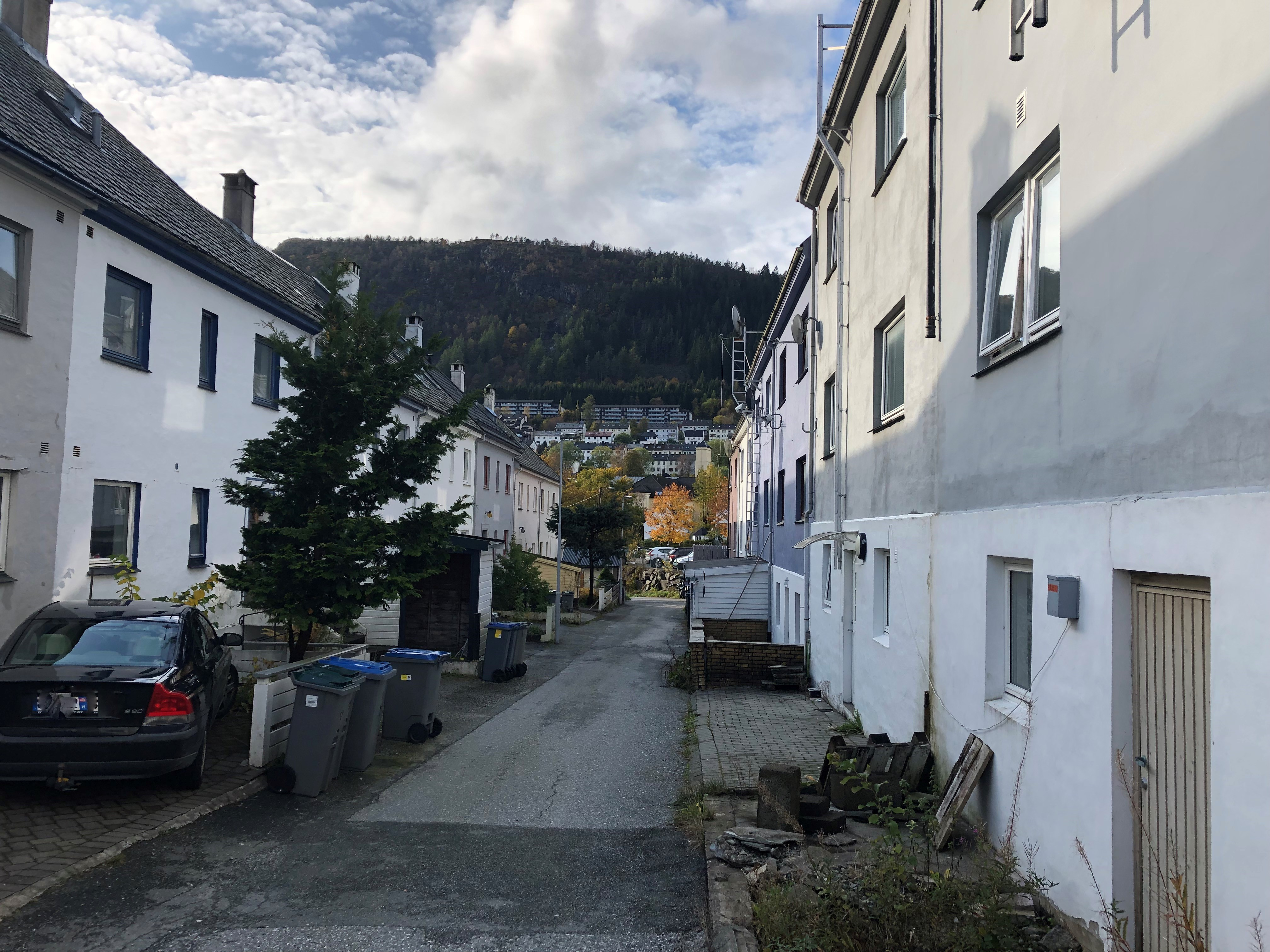 Gatebilde